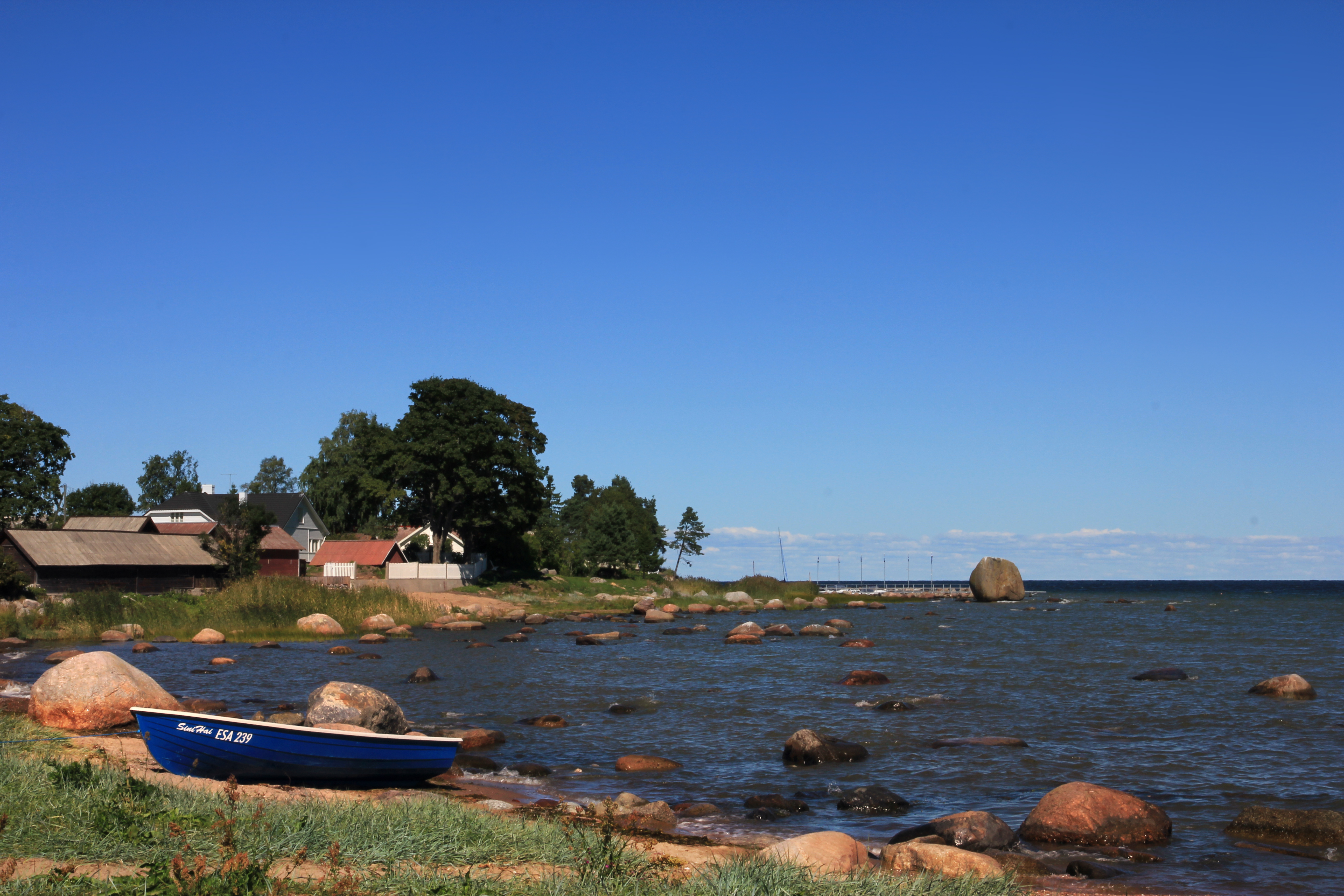 Kivine Käsmu rand